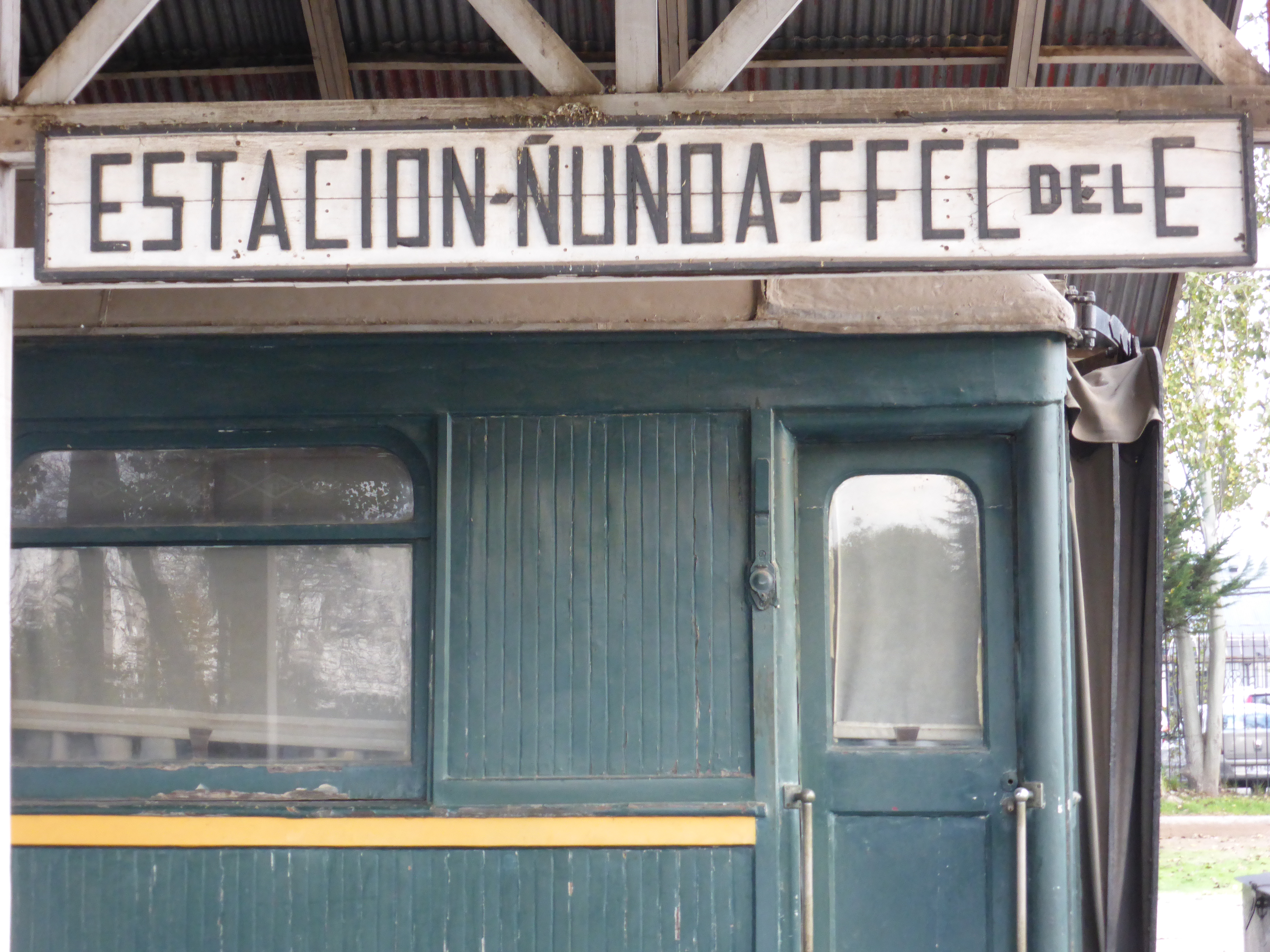 En el "Museo Ferroviario de Santiago" se conserva un cartel original, de madera, de la antigua estación ÑUÑOA, de la línea de circunvalación de Santiago, de "Ferrocarriles del Estado". La estación Ñuñoa fue demolida. Se encontraba cerca de la actual estación Irarrázabal del "Metro de Santiago" (de Chile).